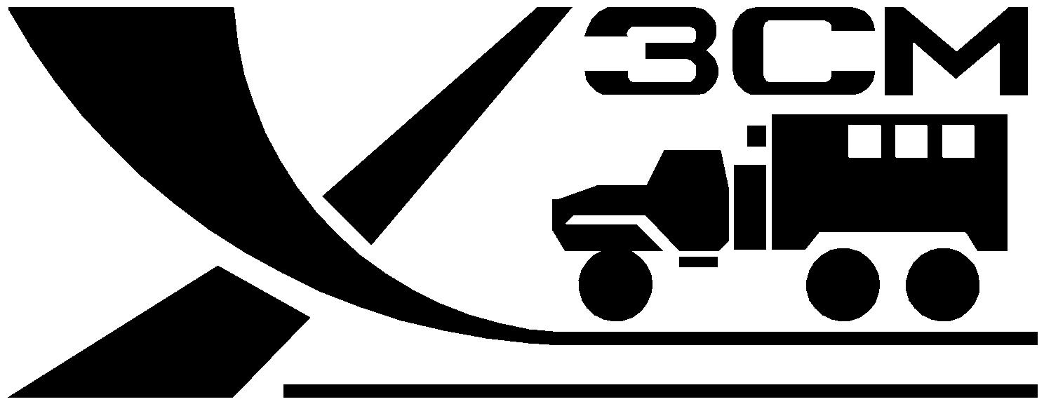 Эмблема Харьковского завода специальных машин